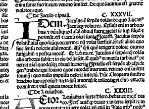 Il paragrafo dello Speculum naturale con le descrizioni di iaculo e ypnale.